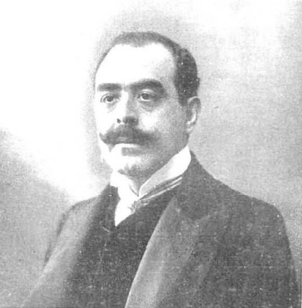 Luis López Ballesteros, por Compañy.